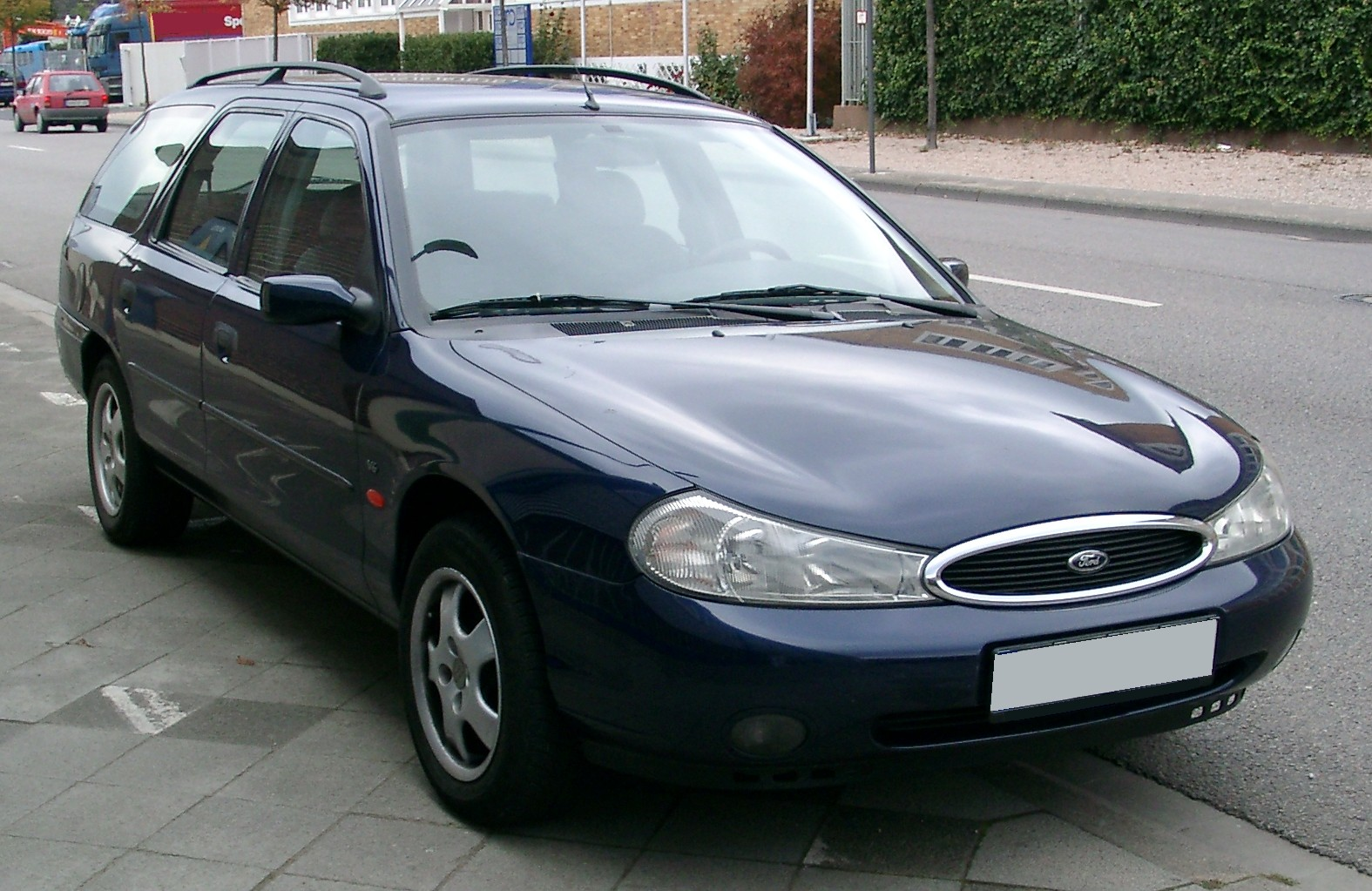 Ford Mondeo Turnier